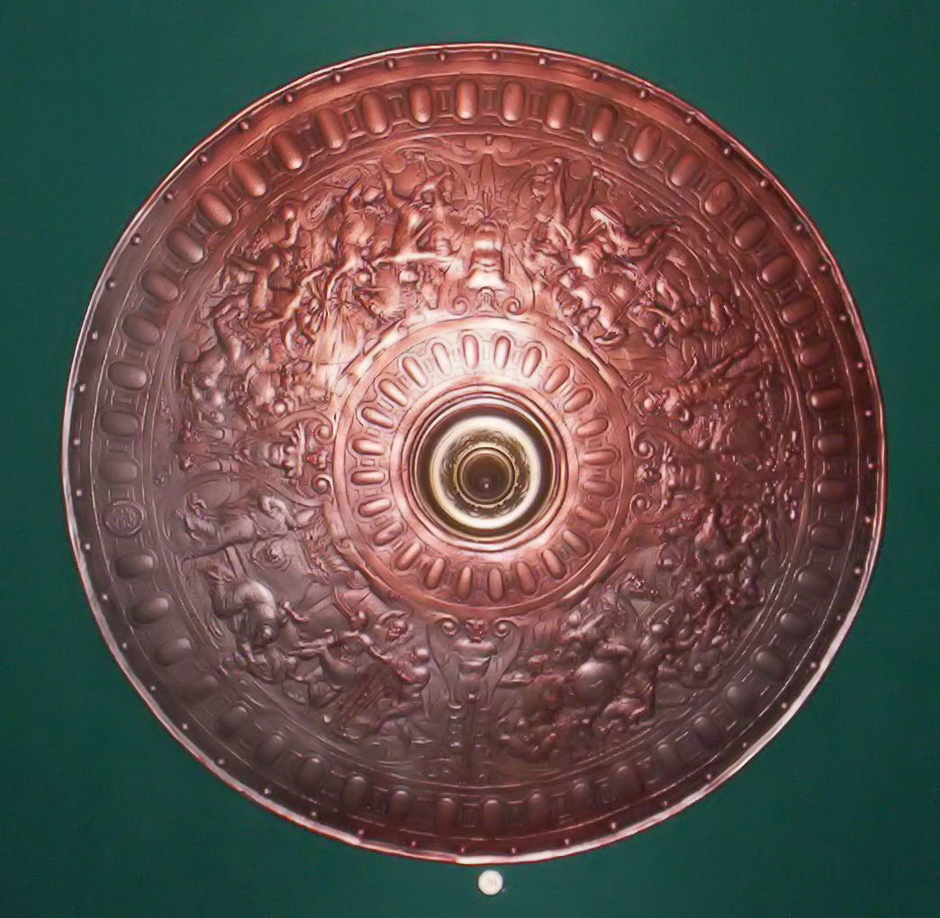 Ezüstözött bronz díszpajzs (19. század) d= 560 mm ; h= 160 mm ; m=1,93 kg. A Csíki Székely Múzeum tulajdona – photo taken by uploader User:Csanády in 2006.